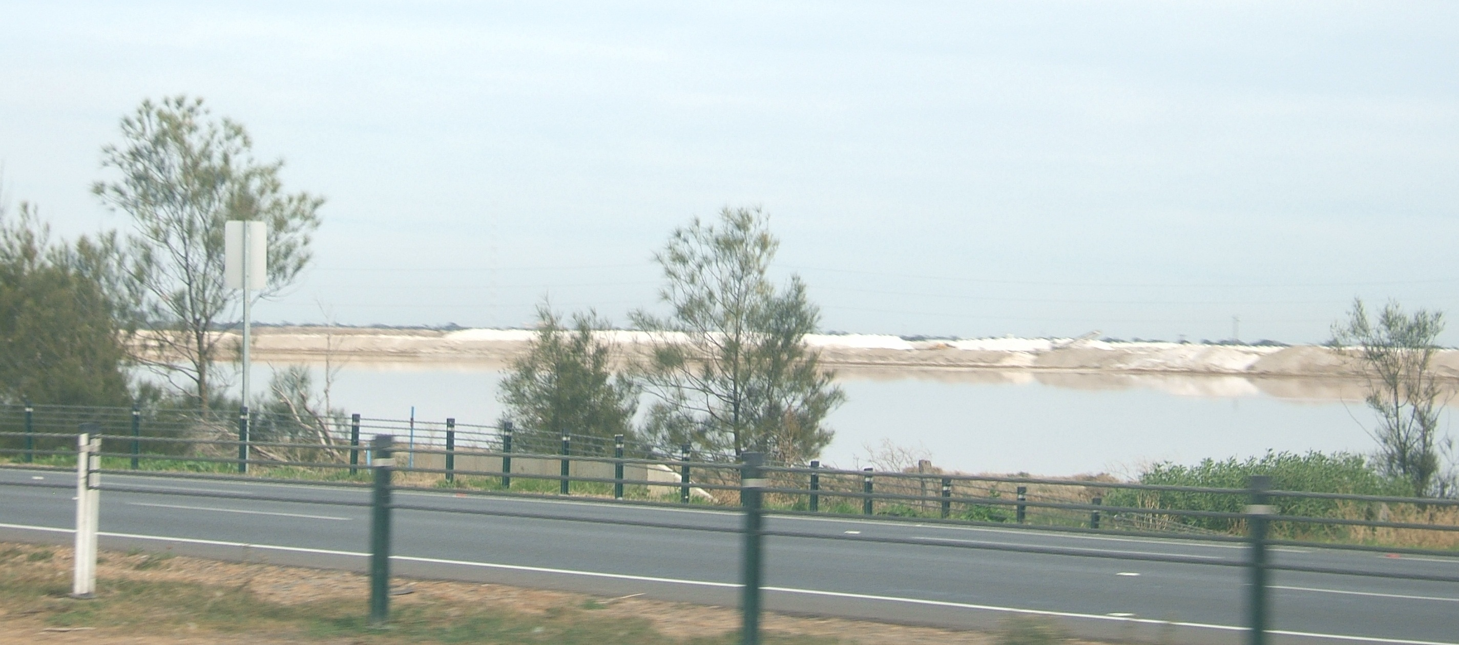 Dry Creek salt pans, Adelaide